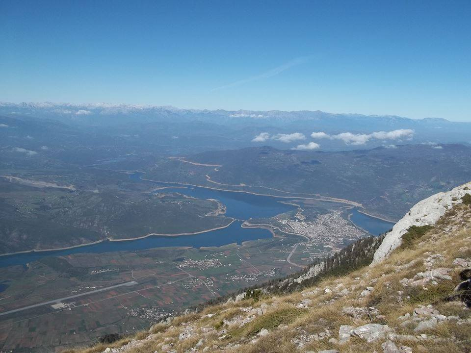 Qyteti Kukesit nga maja Gjalices , liqeni i fierzes dhe malet qe e rrethojne